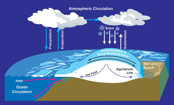 schéma cycle de l'eau atmosphère/océan/glaciers